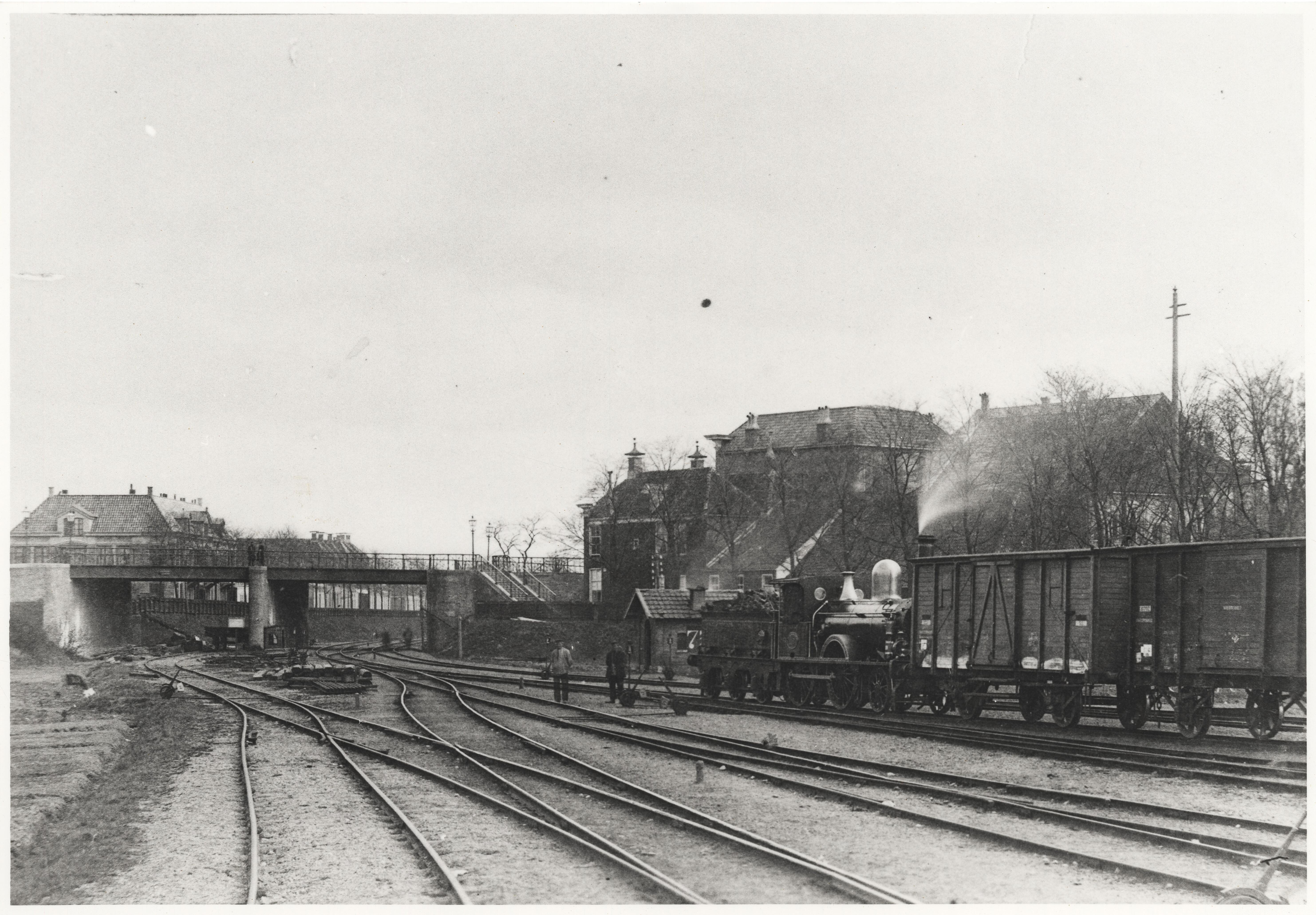 Herewegviaduct gezien vanaf het spoor